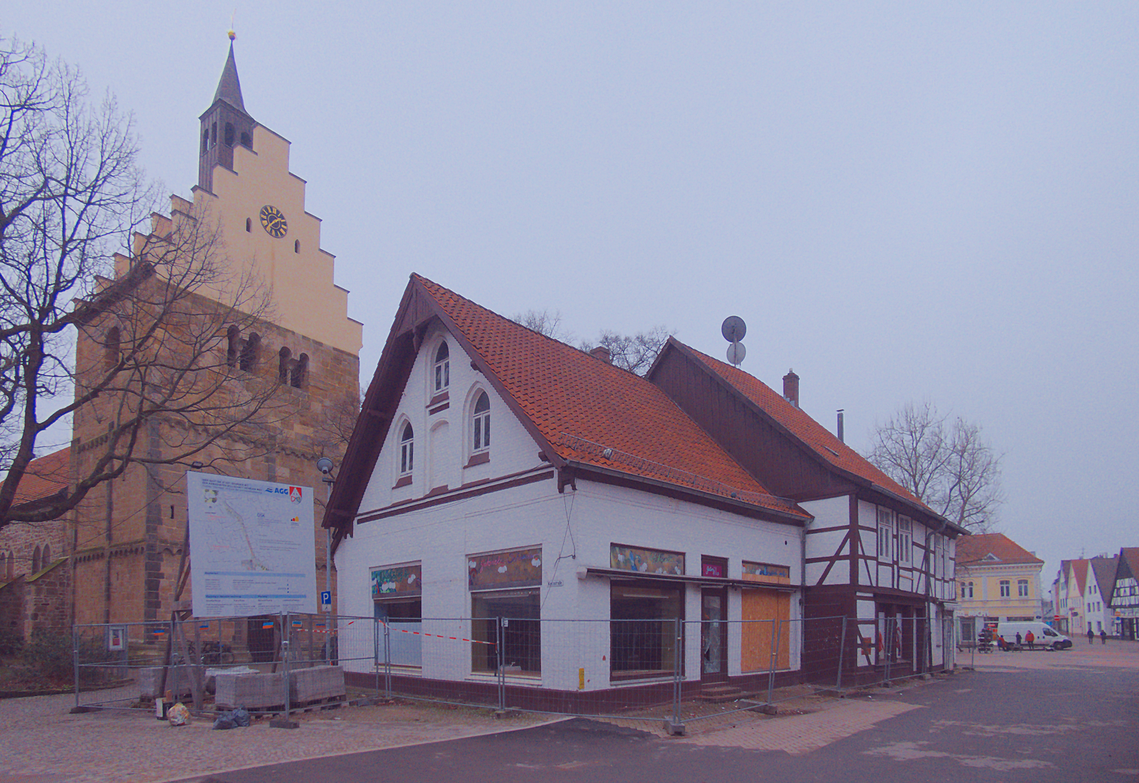 Steinweg 25 in Gehrden, Region Hannover, Niedersachsen. Blick vom Steinweg Richtung Marktplatz und Turm der Margarethenkirche